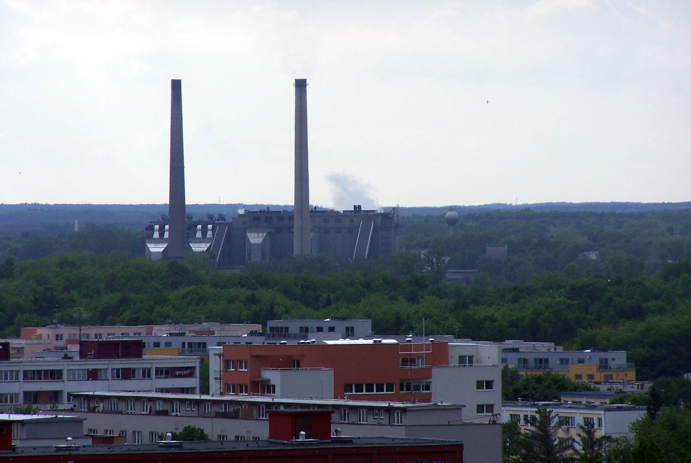 Elektrárna firmy Explosia v Semtíně. GPS: 50.0589961N, 15.7247225E